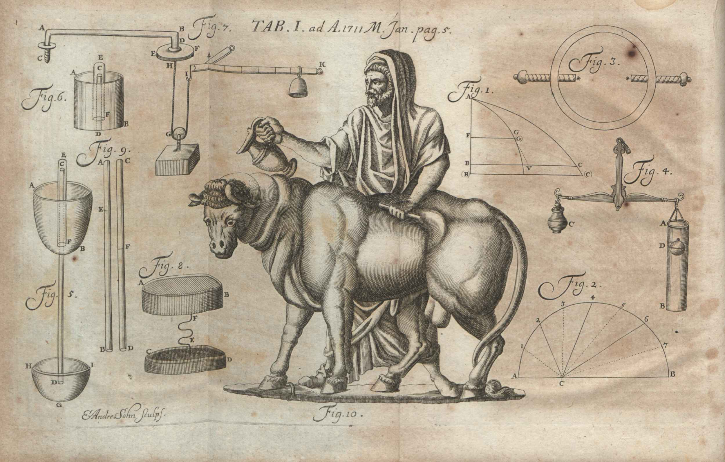 Illustration